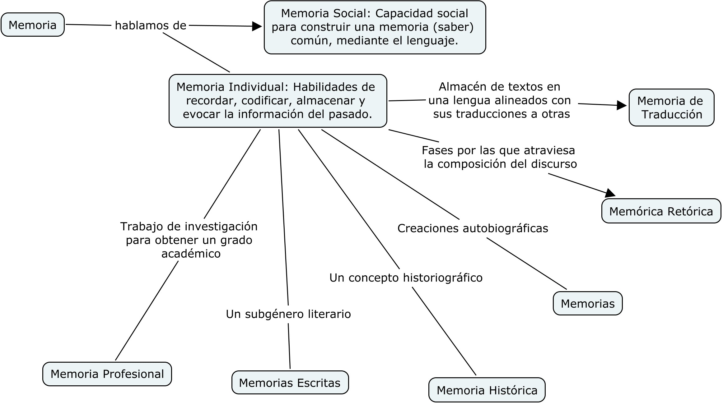 Por memoria entendemos lo relacionado con las habilidades de la mente, en particular la capacidad, (proceso) de recordar. Es importante enfatizar en la diferencia entre mente y cerebro: la memoria es una función del cerebro y un fenómeno de la mente. La memoria permite codificar, almacenar y evocar la información del pasado, como un resultado de las conexiones sinápticas repetitivas entre las neuronas, lo que crea redes neuronales. Hablamos de una memoria individual, y de una memoria colectiva, ambas interrelacionadas. La memoria colectiva es la capacidad que las sociedades poseen para construir mediante el lenguaje una memoria, (saber), común. La memoria individual -en tanto género escrito-; se conforma tanto de memorias escritas (subgénero literario didáctico), histórica (concepto historiográfico), memorias (ligado a la autobiografía), retóricás (fases por las que atraviesa la composición del discurso), de traducción (almacén de textos en una lengua alineados con su traducción a otras), de título (trabajo de investigación para obtener un grado académico).